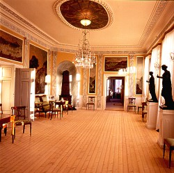 Havesalen på Ulefos Hovedgaard. Bildet er avklart for bruk av Ulefos Hovedgaard.